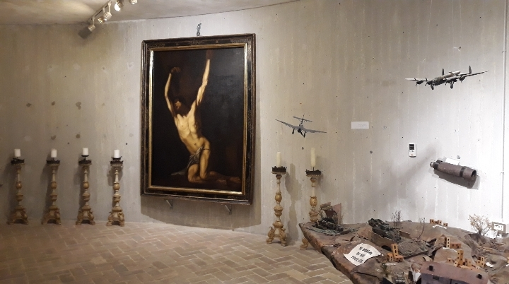 Museo della Linea dei Goti This is a photo of a monument which is part of cultural heritage of Italy.